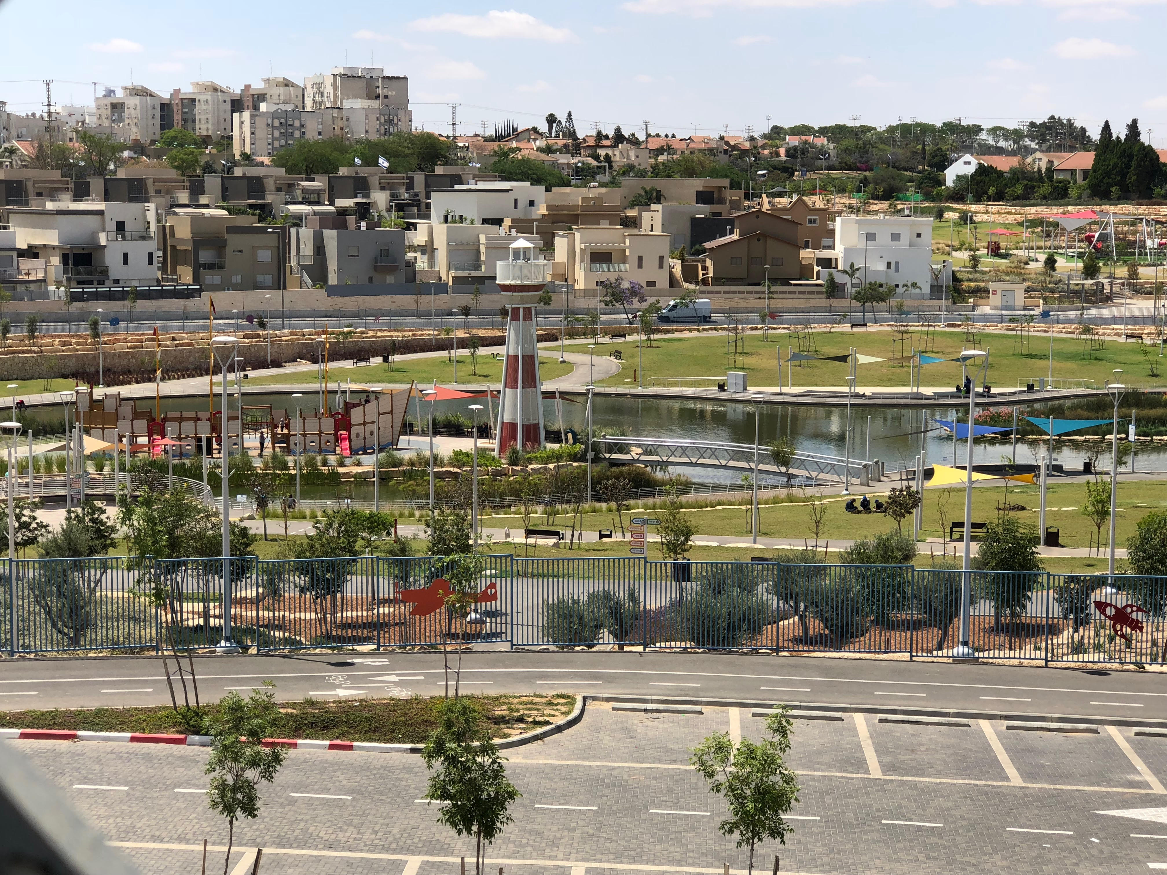 פארק הילדים